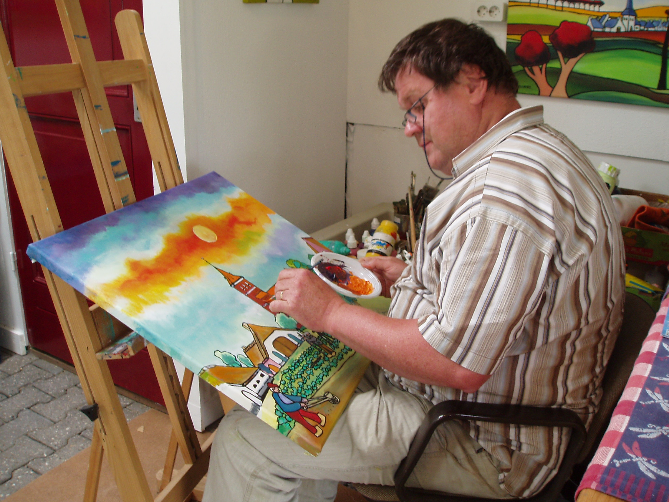 Cor Melchers schildert in zijn atelier in Huissen